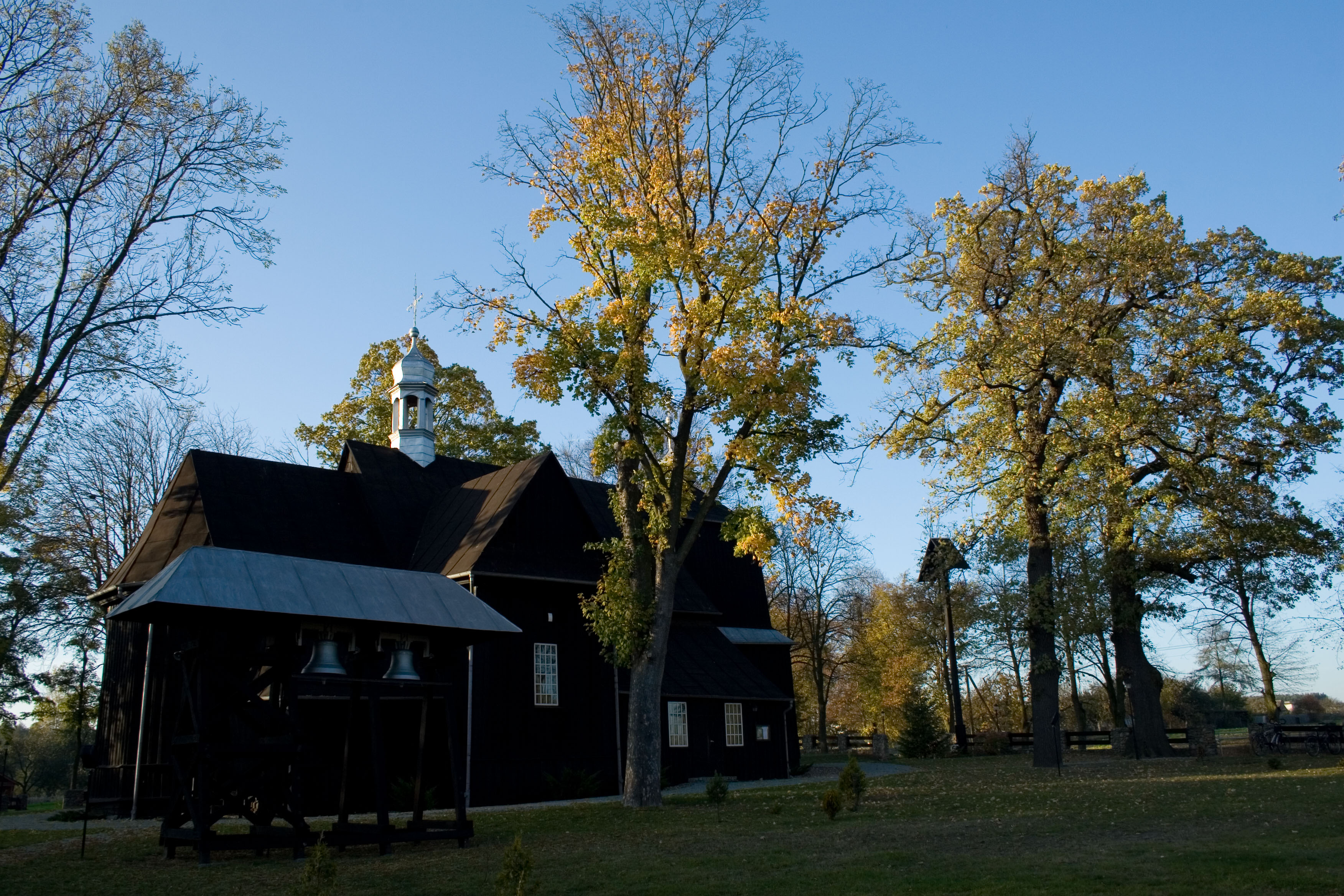 Drewniany kościół w miejscowości Parzynów (woj. wielkopolskie)